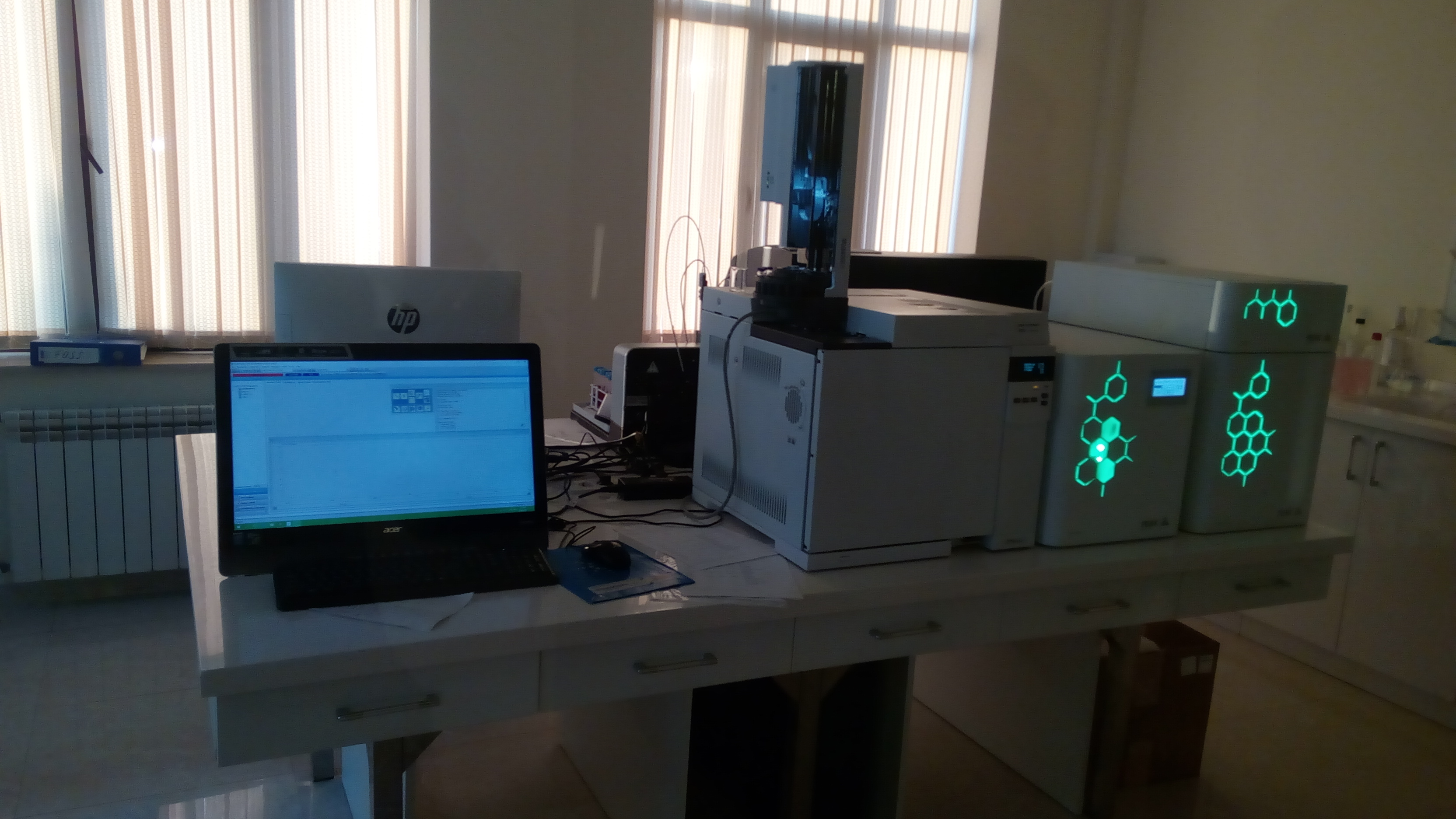 MİRAS-la Az-Granataya səfər